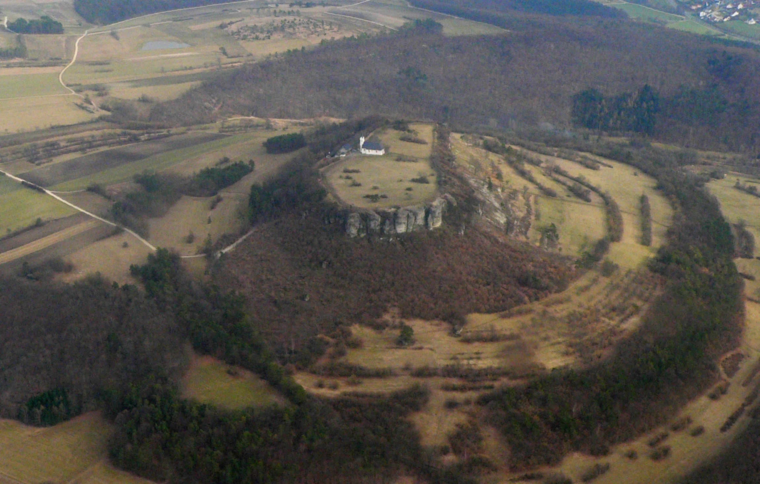 Staffelberg bei Staffelstein, Oberes Maintal, Bayern